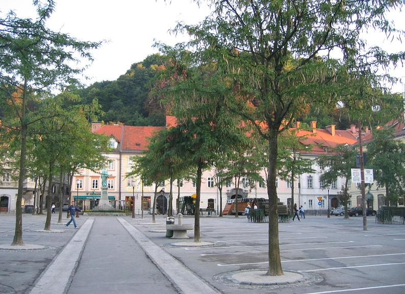 Valentin Vodnik square, Ljubljana photo:Ziga 07:47, 28 April 2006 (UTC)